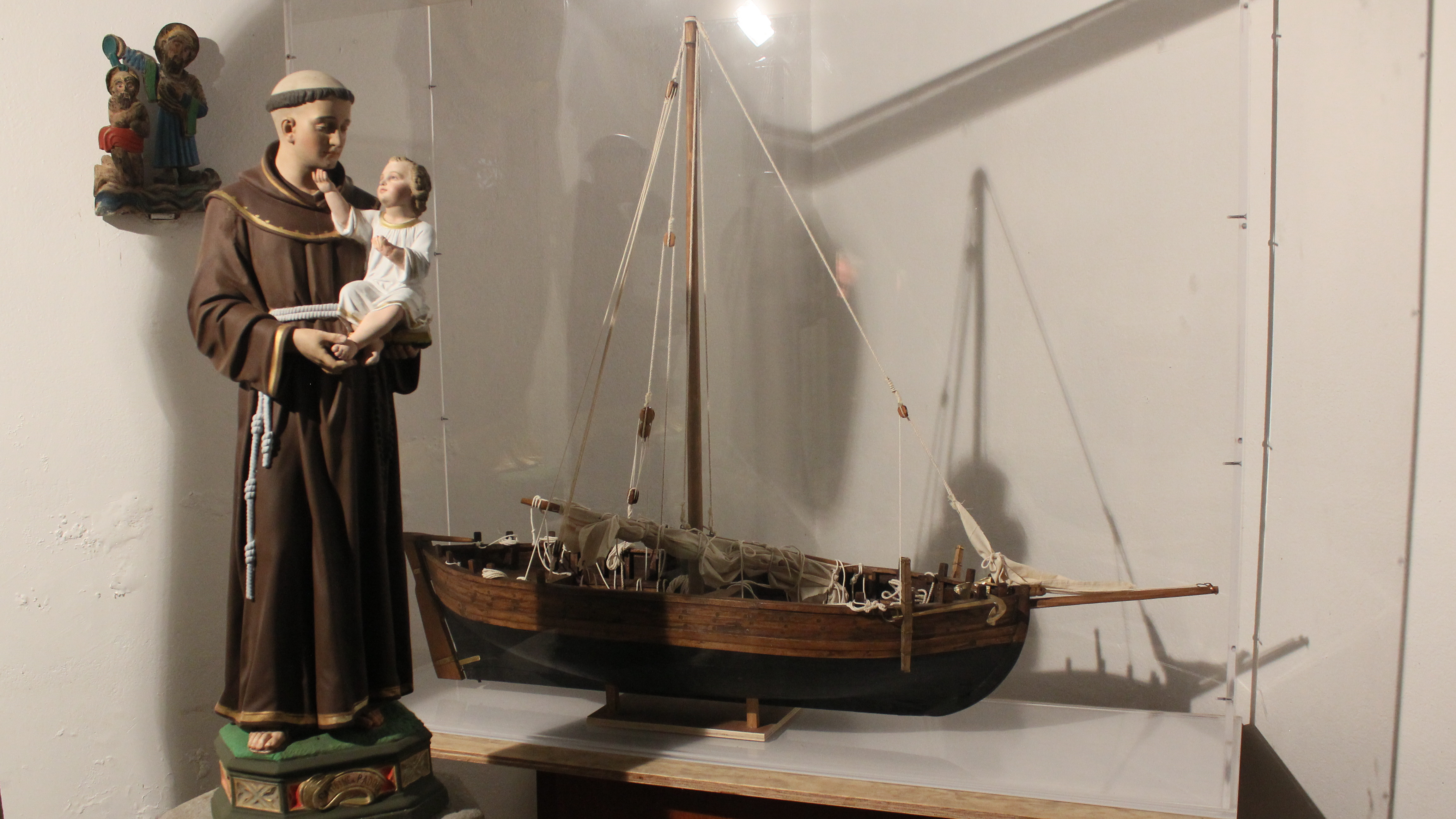 St Antoine de Padoue et le bateau de Lanvéoc